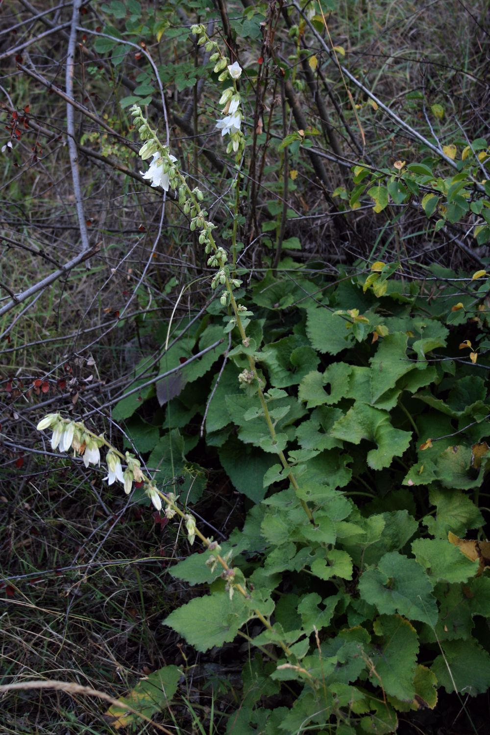 Campanula alliariifolia subsp. alliariifolia, Glockenblumengewächse (Campanulaceae) – Georgien/საქართველო: Tbilissi/თბილისი, SW Botanischer Garten, ca. 610 m s.m.